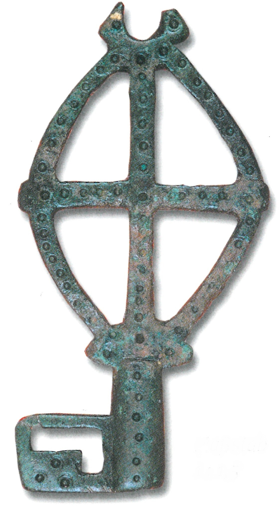 Karolingischer Schlüssel (8./9. Jhd.), Bronze, Länge 12 cm, Breite 4,5 cm, gefunden 1939 bei Ausgrabungen, wohl aus dem Frauenkloster Münsterschwarzach